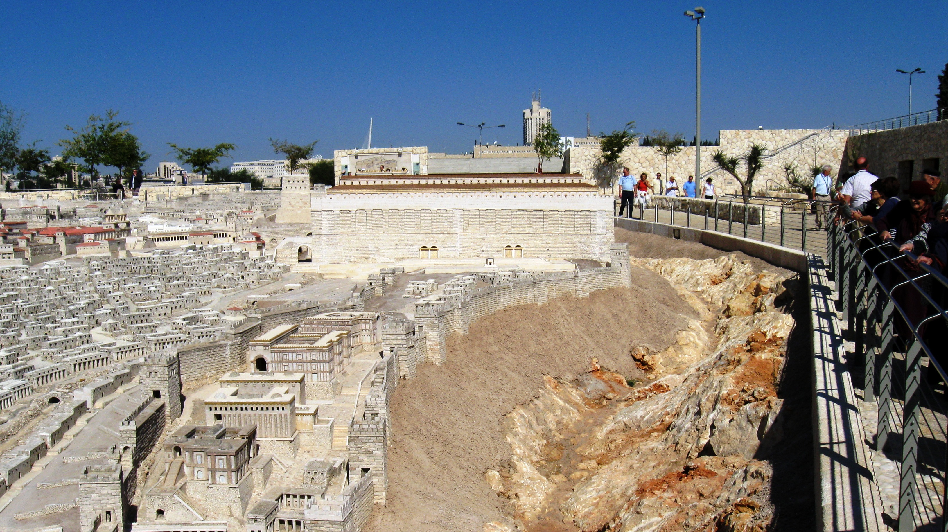 TheTample_and_City_of_David_ftom_Kidron_Valley רישיון נוצר על ידי משתמש:Daniel Ventura